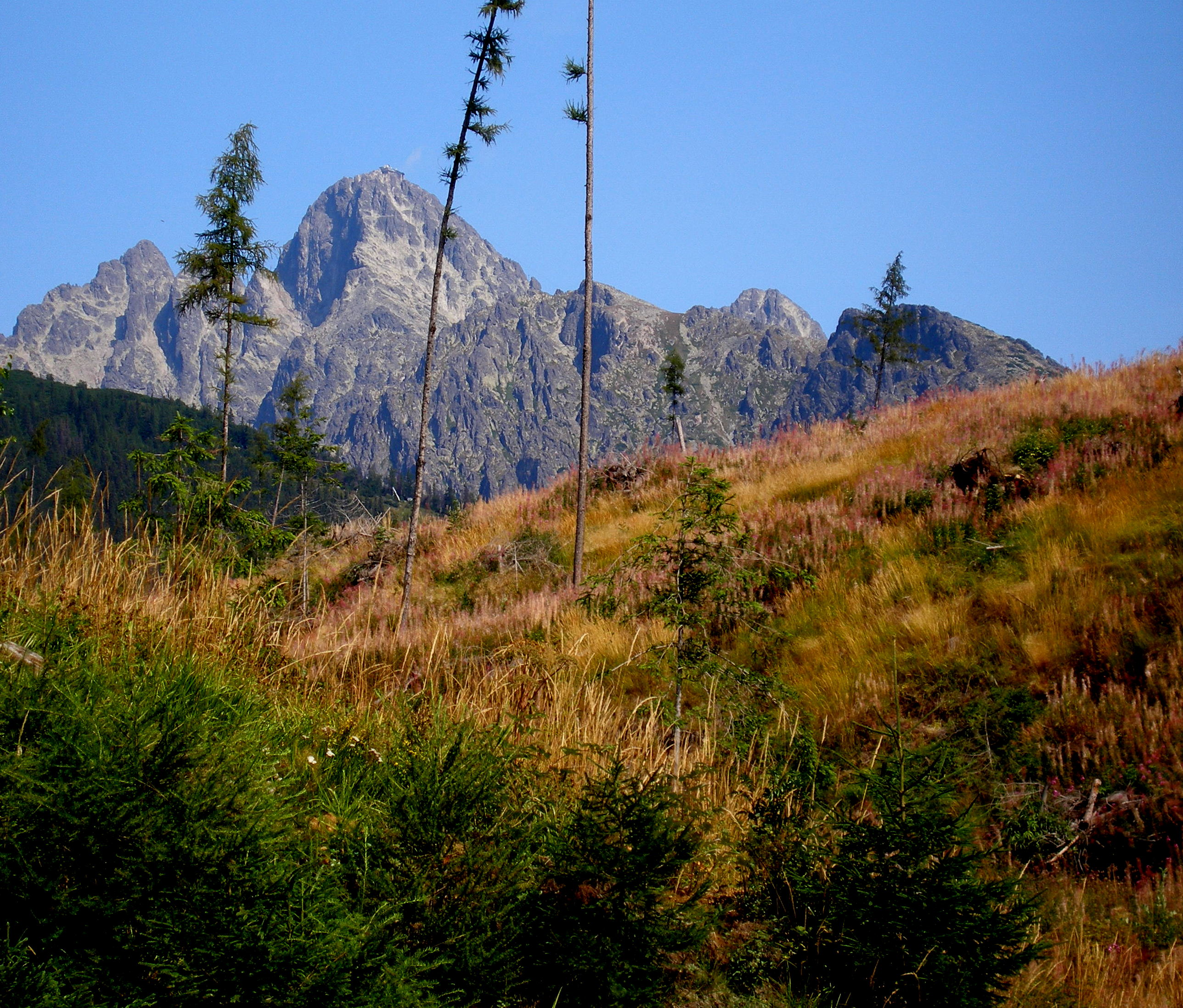 Pohľad na Lomnický štít z Tatranských Matliarov